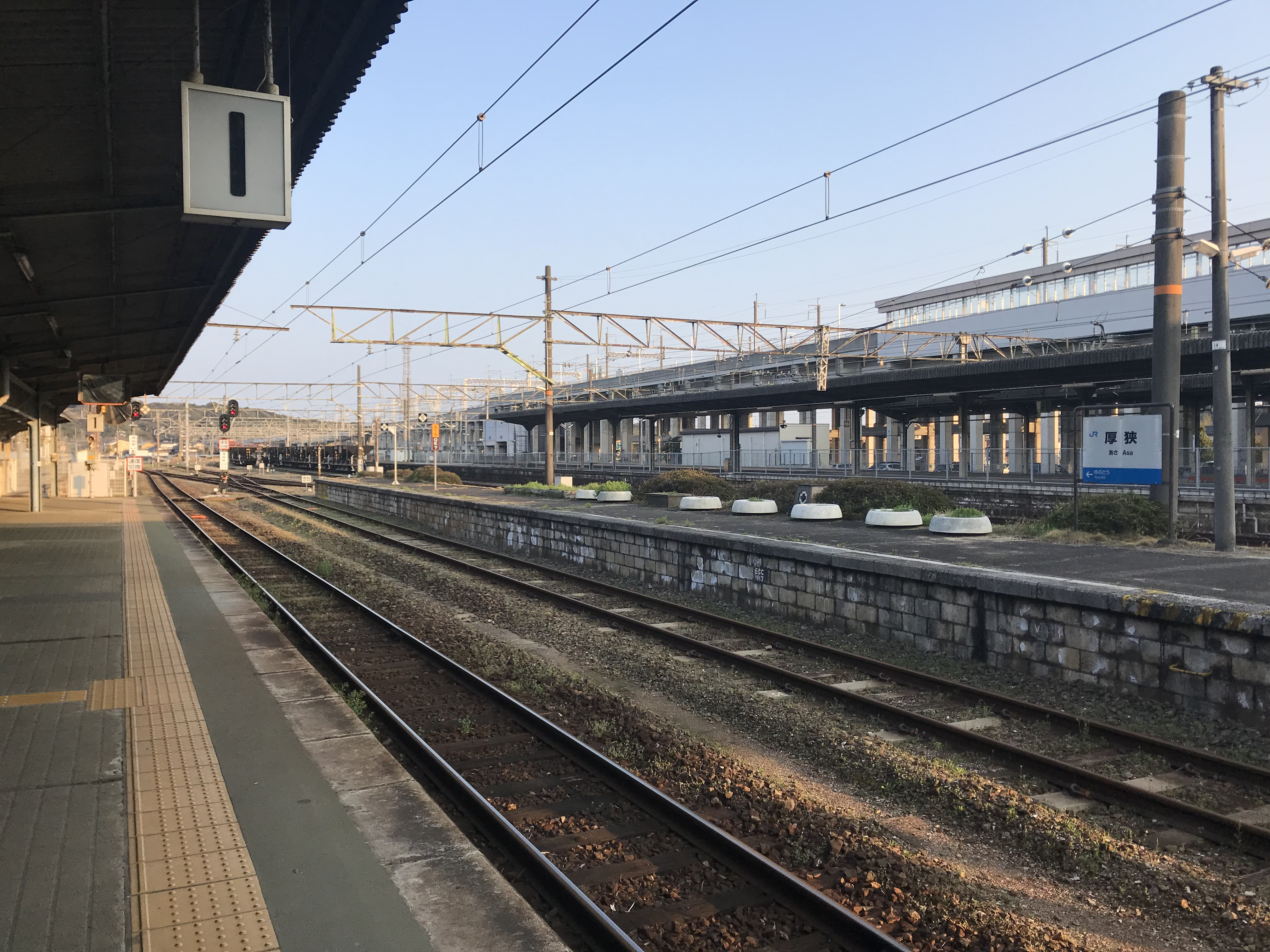 厚狭駅のホーム(奥は小野田・湯ノ峠方面)